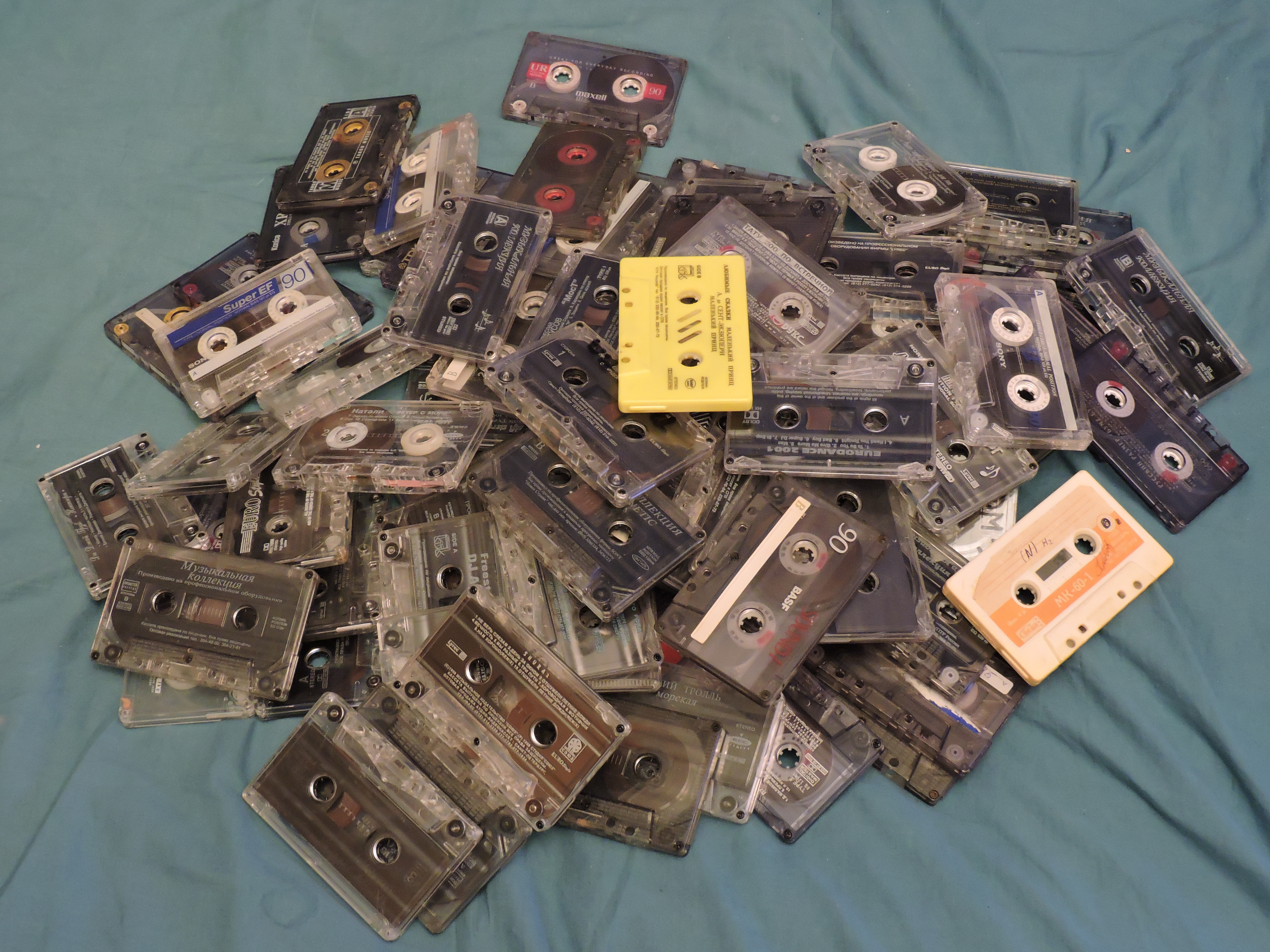 Куча аудиокассет из моей коллекции! Накоплена ещё с 90-х гг. Из-за того, что являются аналоговыми носителями информации, занимают в доме много ненужного пространства, а посему в итоге были вытеснены компакт-дисками. А всё равно выбросить как-то руки не доходят. Раритет же, ребята!